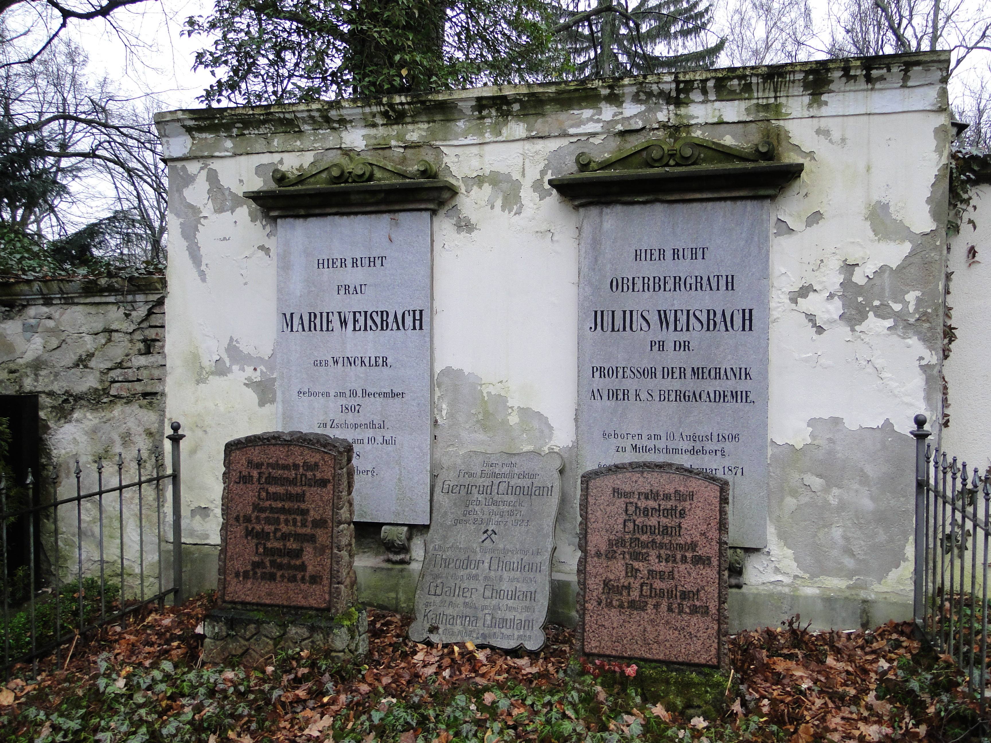 Grab von Julius Weisbach auf dem Donatsfriedhof in Freiberg